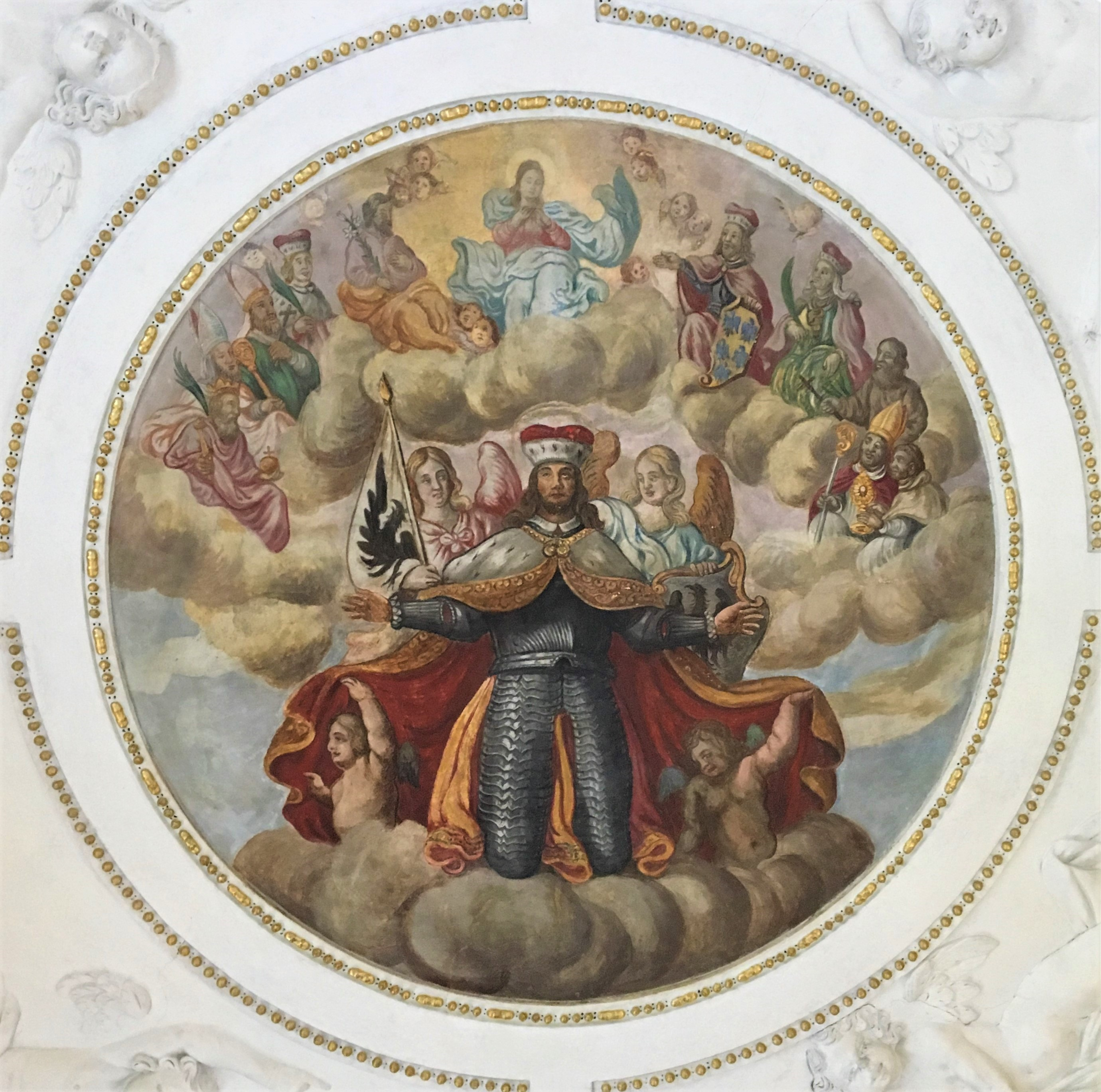 Nástropní malba sv. Václav s patrony České země od Fabiána Šebestiána Václava Harovníka v kapli sv. Václava v Lobkowiczském paláci na Pražském hradě.